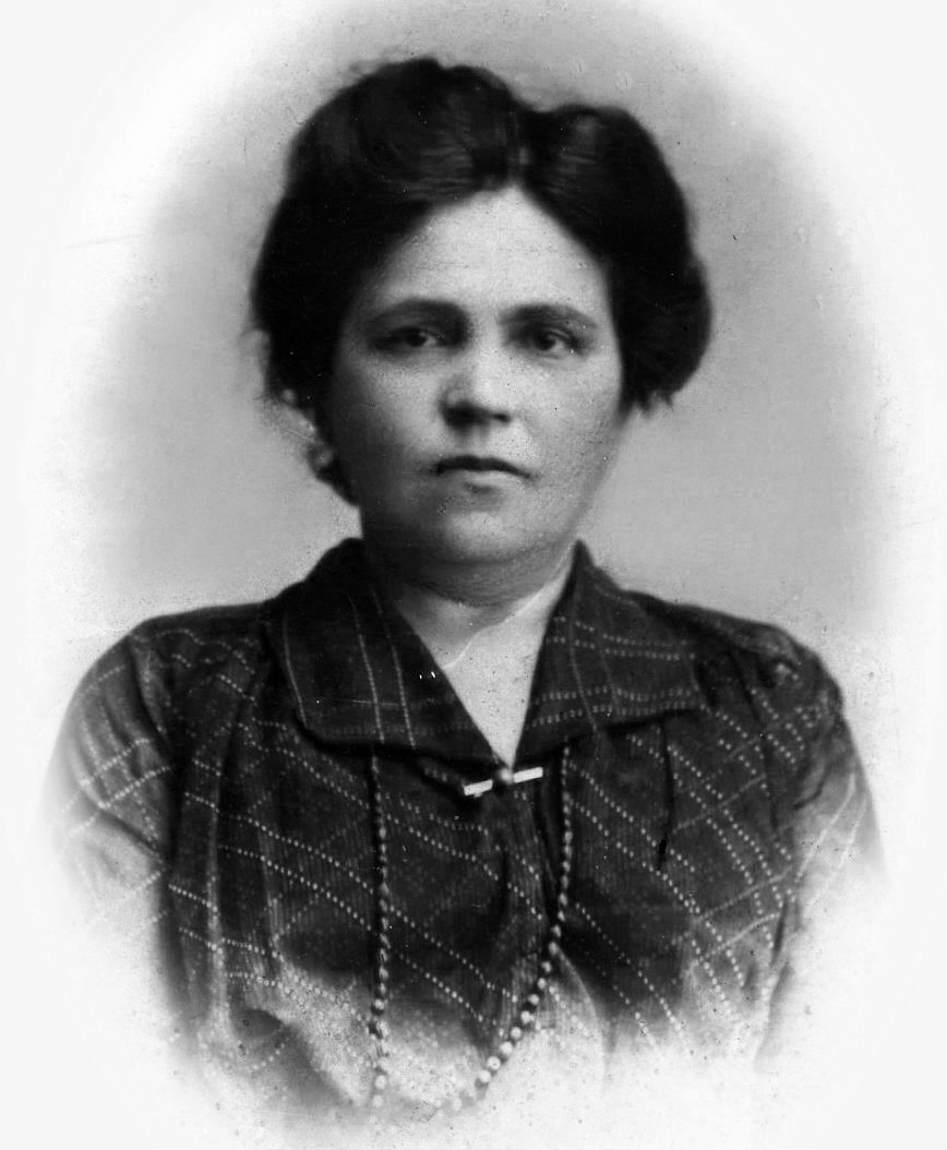 Портрет Людмили Старицької-Черняхівської